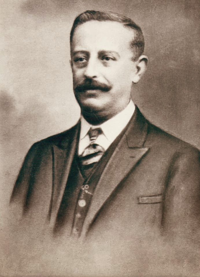 Sesotho: Jose Ramírez I